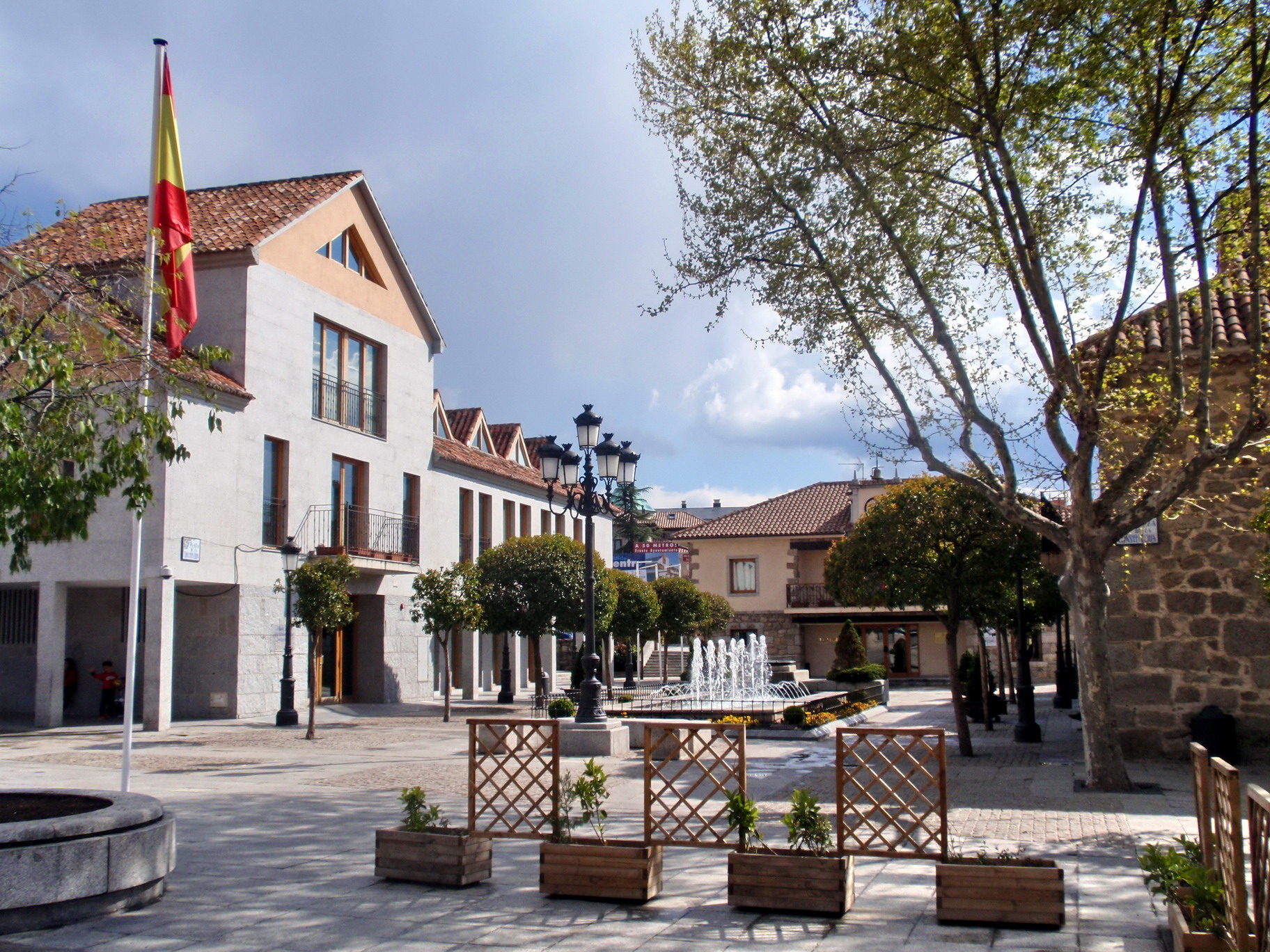 Torrelodones. Plaza de la Constitución y bandera.